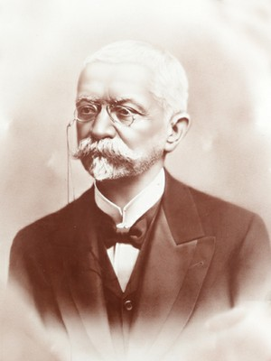 Foto de Afonso Pena da Presidência da República Federativa do Brasil.